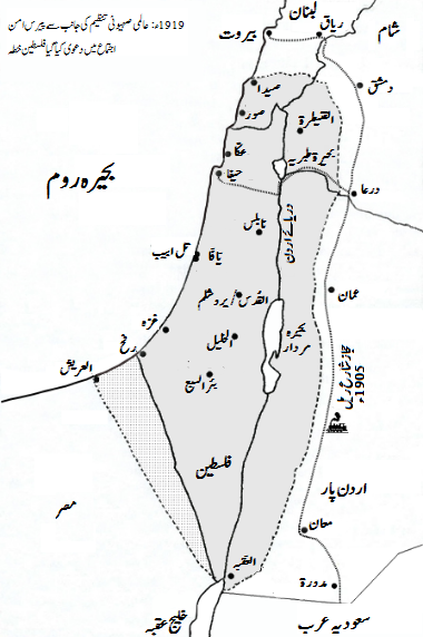 1919ء : عالمی صہیونی تنظیم کی جانب سے پیرس امن اجتماع میں دعوی کیا گیا فلسطین خطہ